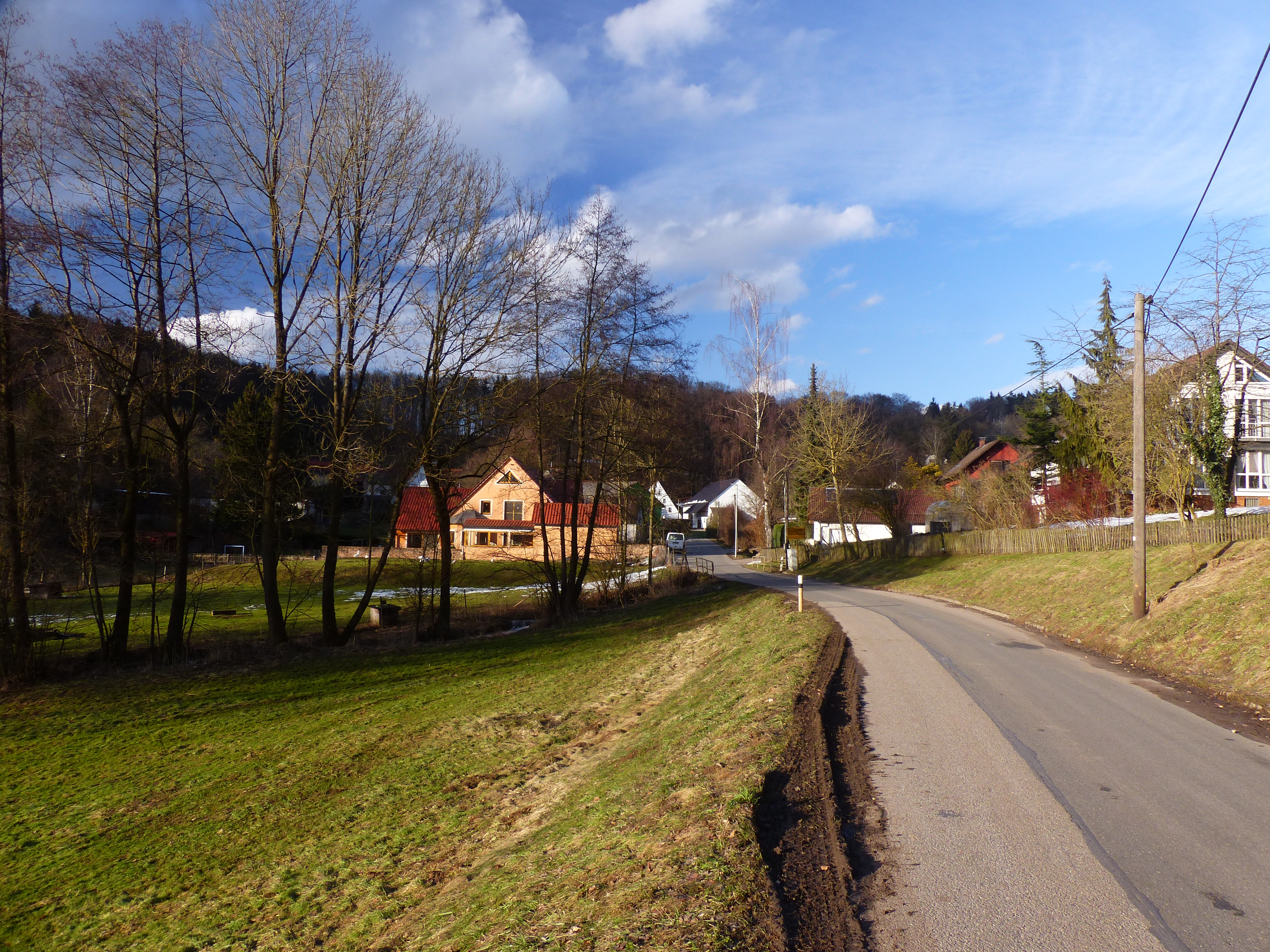 Raschbach, ein Ortsteil der Stadt Altdorf bei Nürnberg